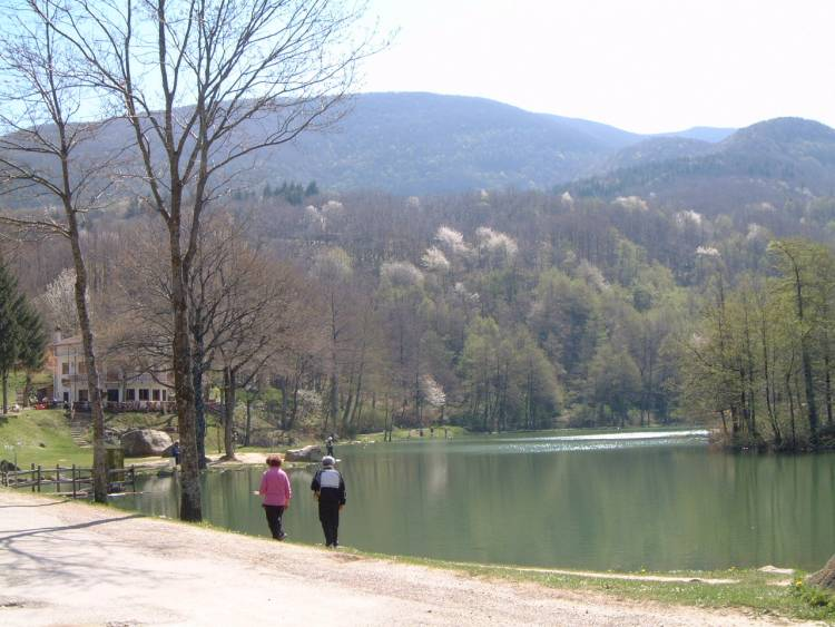 Je suis l'auteur de cette photo prise en avril 2007 au lac Pontini (vallée du Savio, Italie).